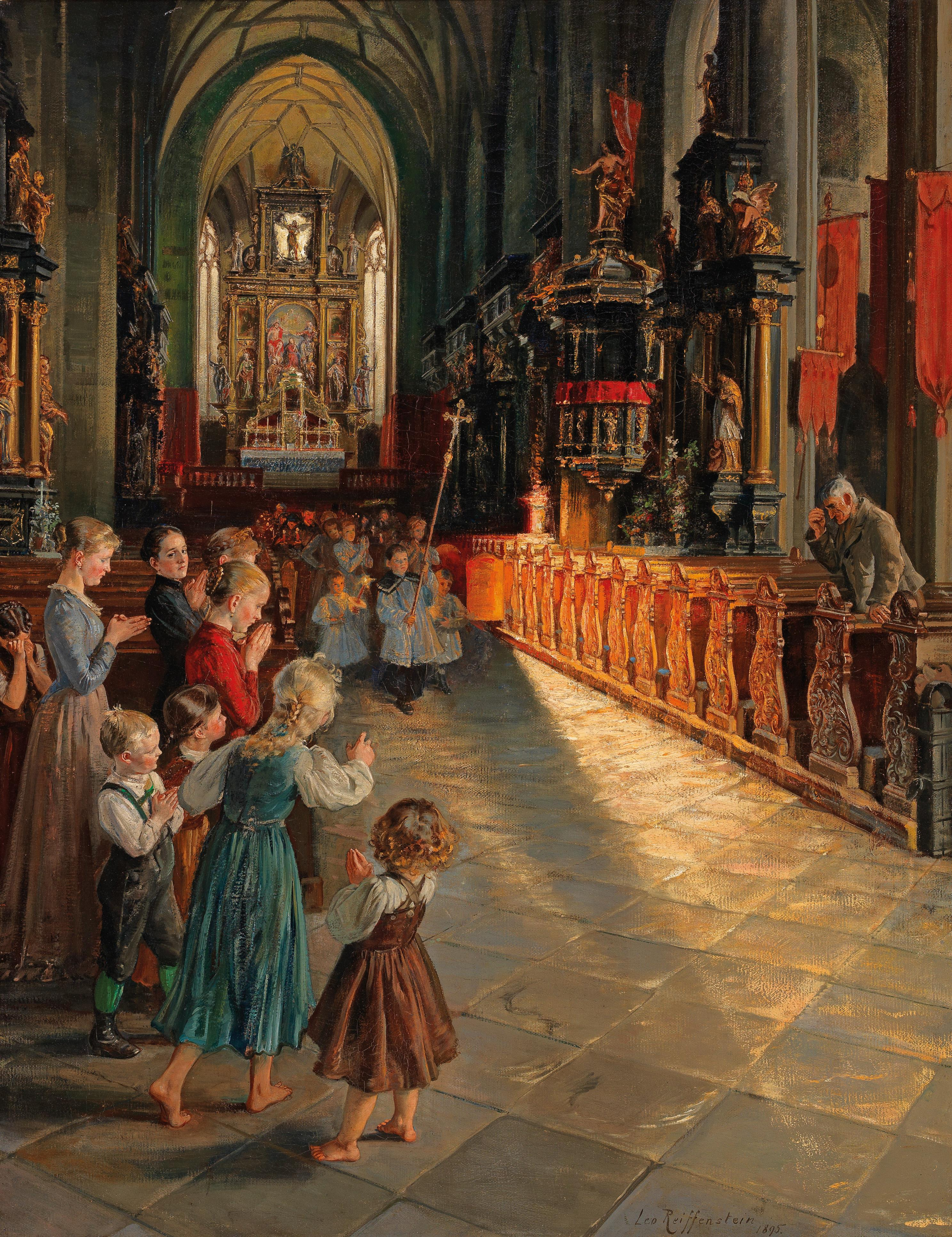 “Inneres der Kirche zu Mondsee”, rückseitig auf Ausstellungsetikett betitelt, signiert, datiert Leo Reiffenstein 1895, Öl auf Leinwand, 96 x 74,5 cm